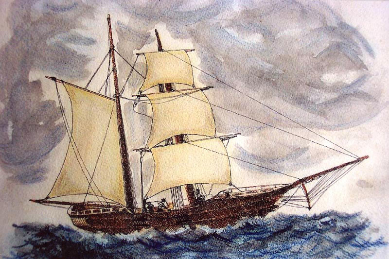 Pintura de la Goleta Alcance de propiedad del historiador CPFG Mariano Sánchez Bravo, autor intelectual de este grabado. Utilizado en publicaciones de la Armada del Ecuador.